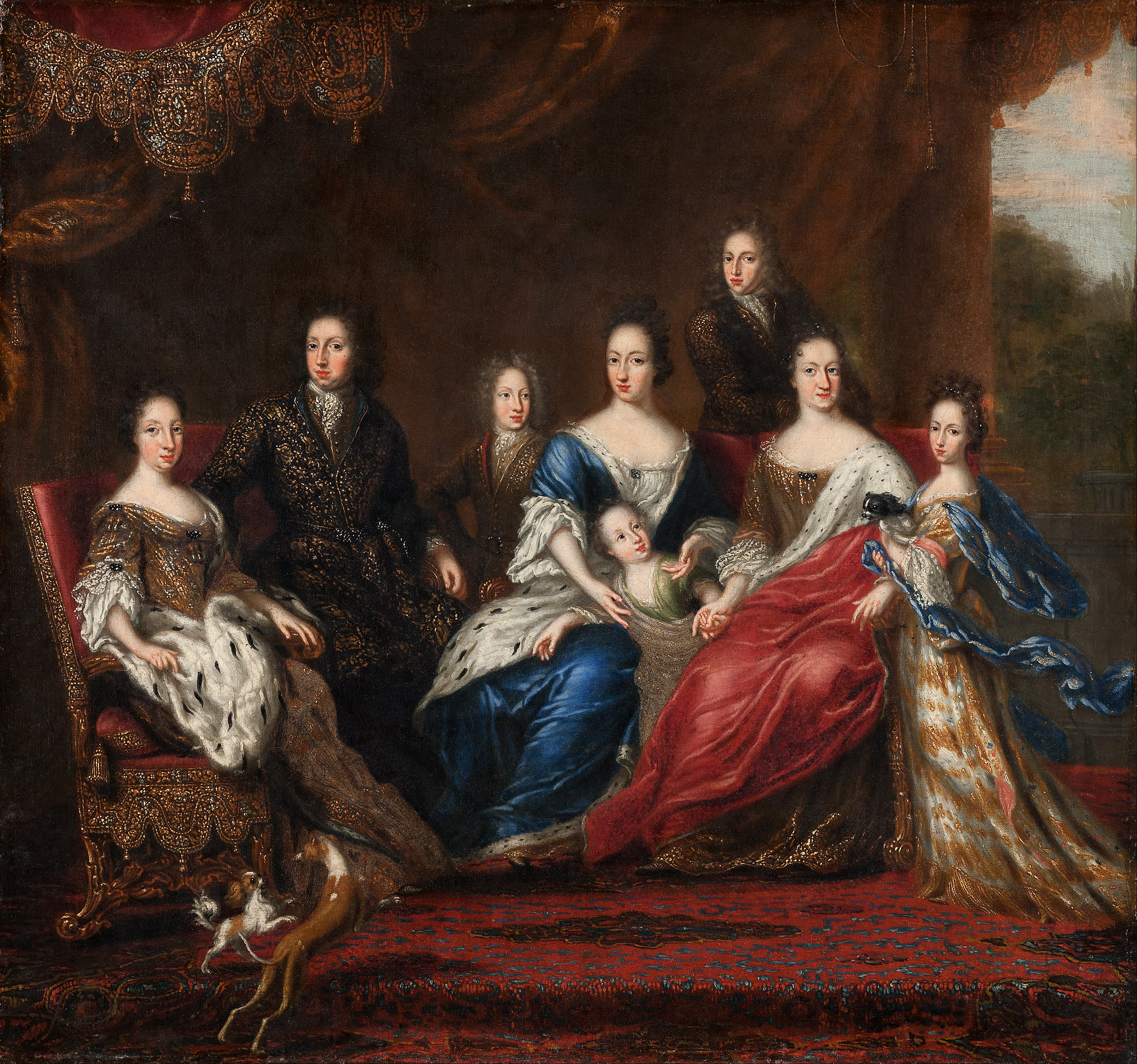 Karl XI med släktingar från hertigdömet Holstein-Gottorp